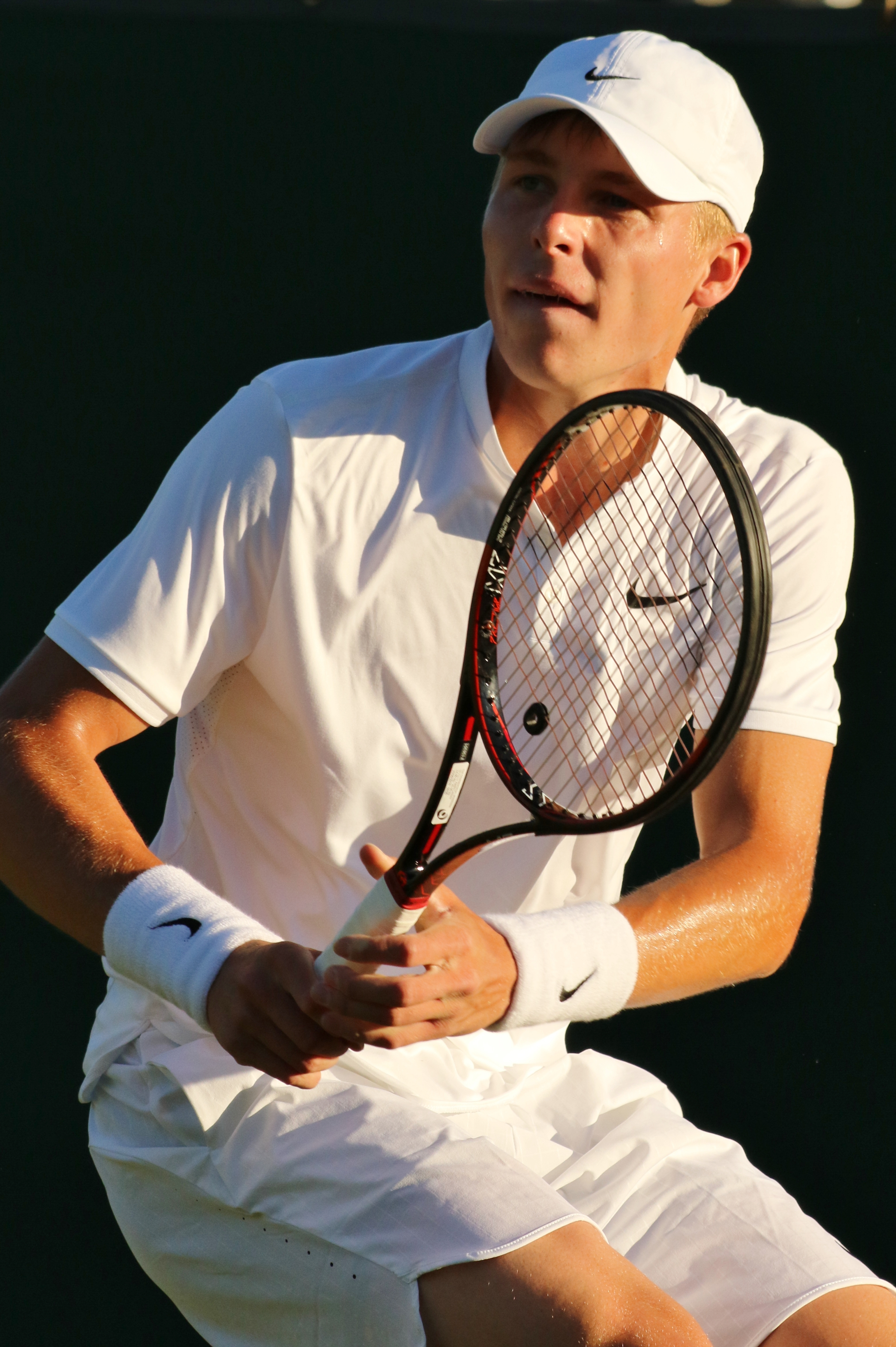 Ivashka WMQ16 (49)